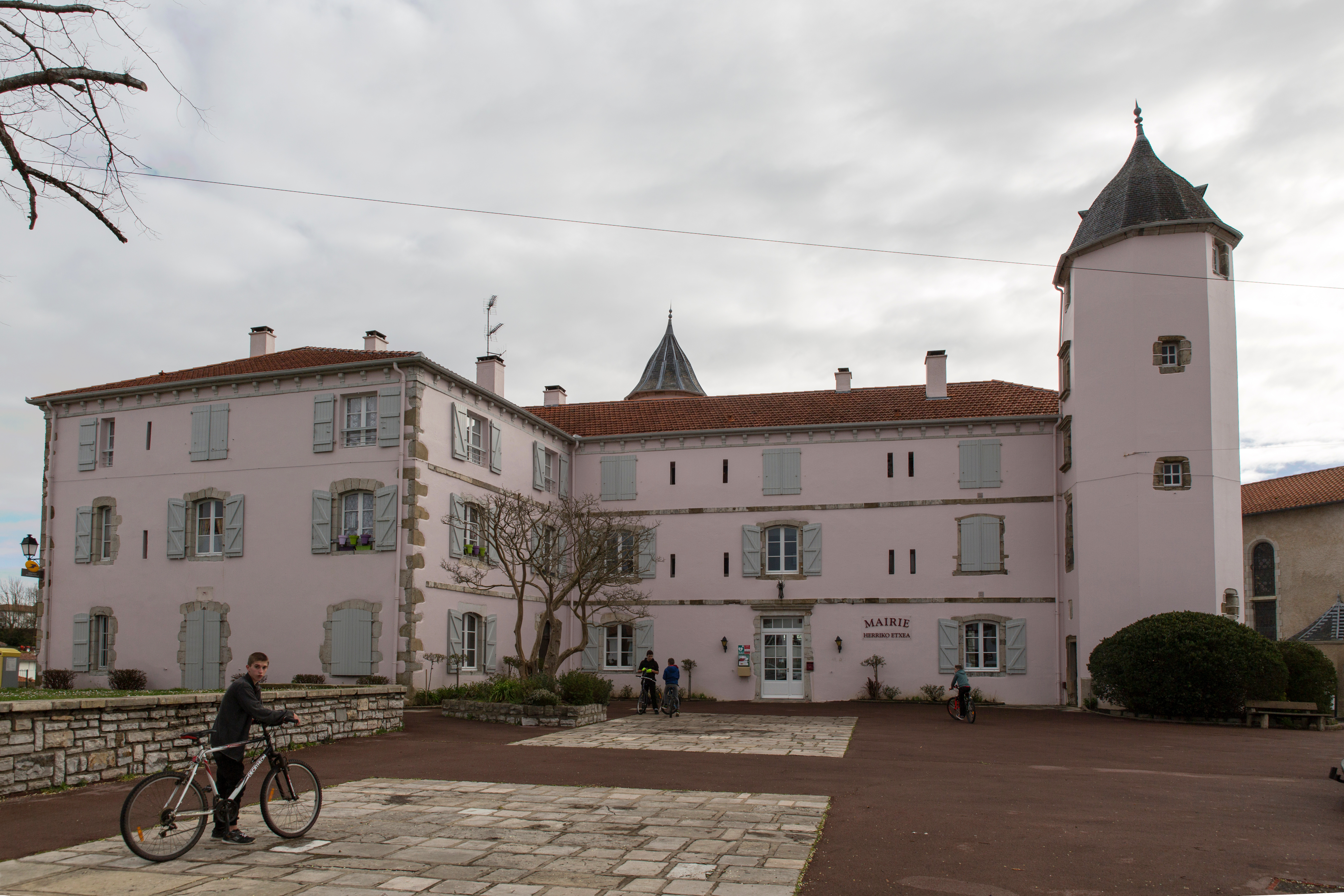 Mairie